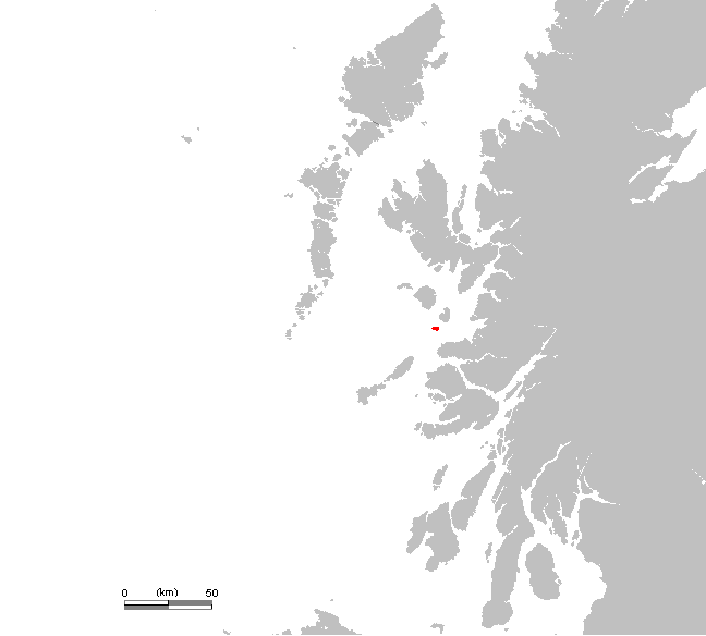 UK Muck.PNG (Scotland, Hebrides)